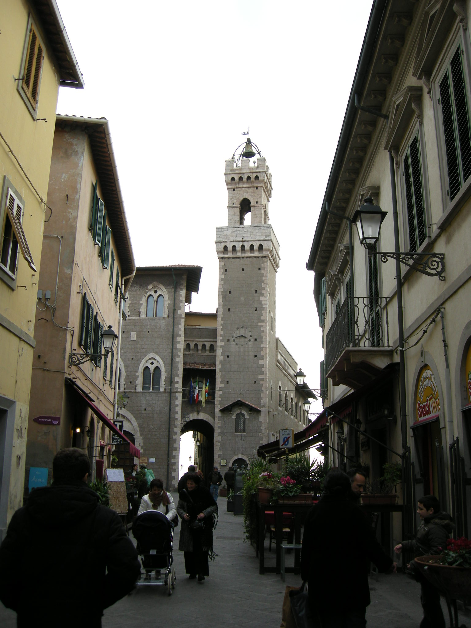 Via vittorio emanuele II, torre dell'orologio